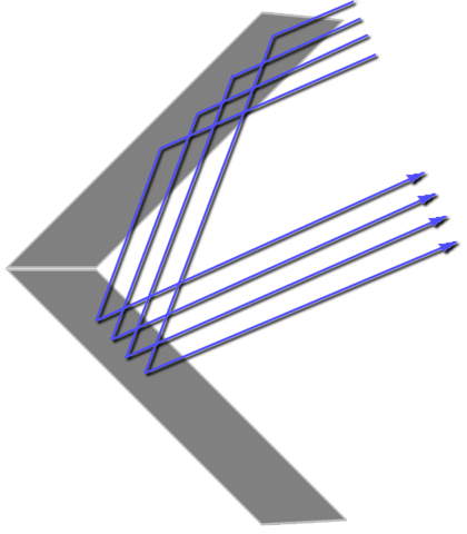 Prinzip eines Winkelreflektors